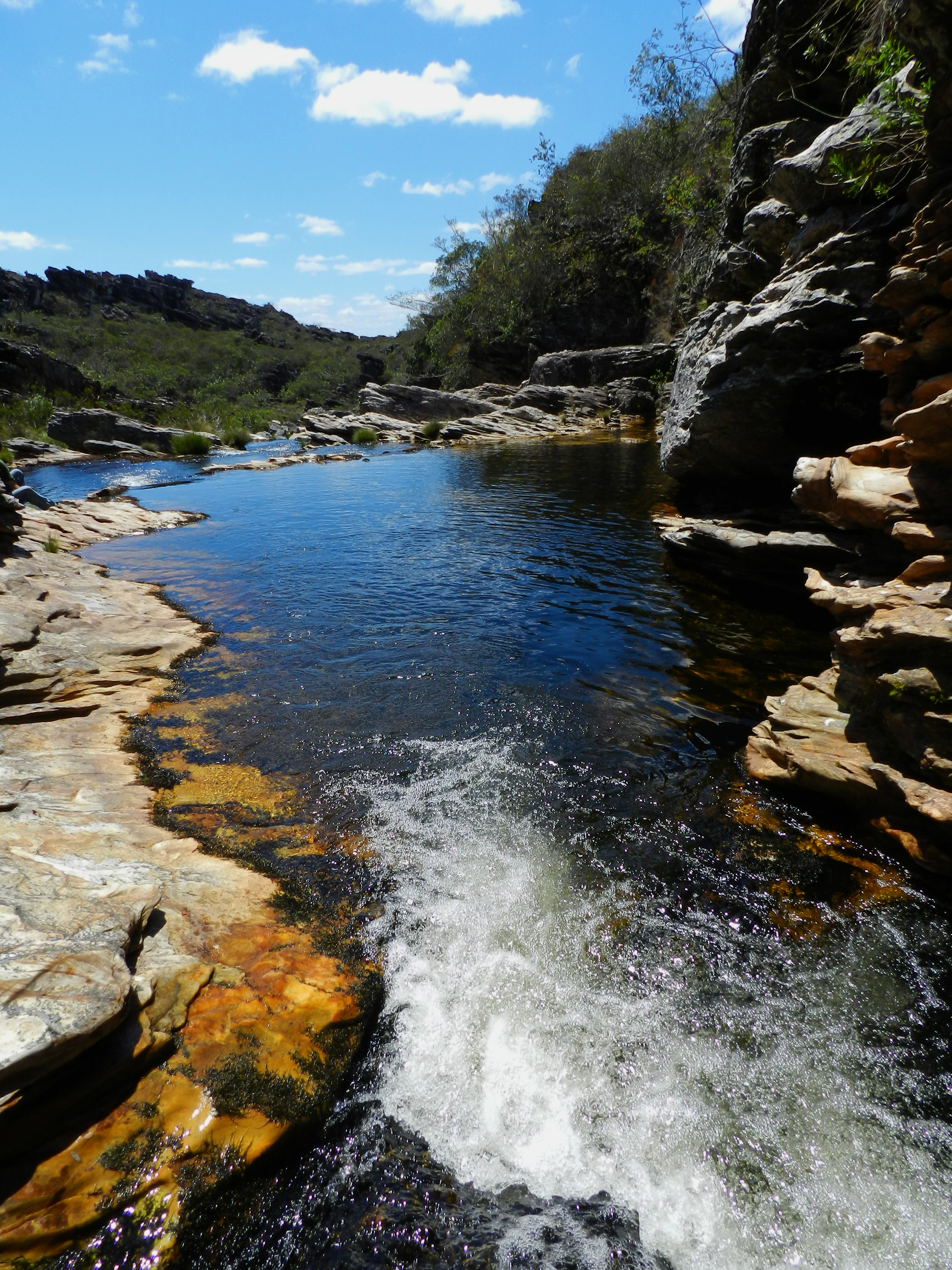 Rio Preto reflete o azul do céu azul, nas "Corredeiras".